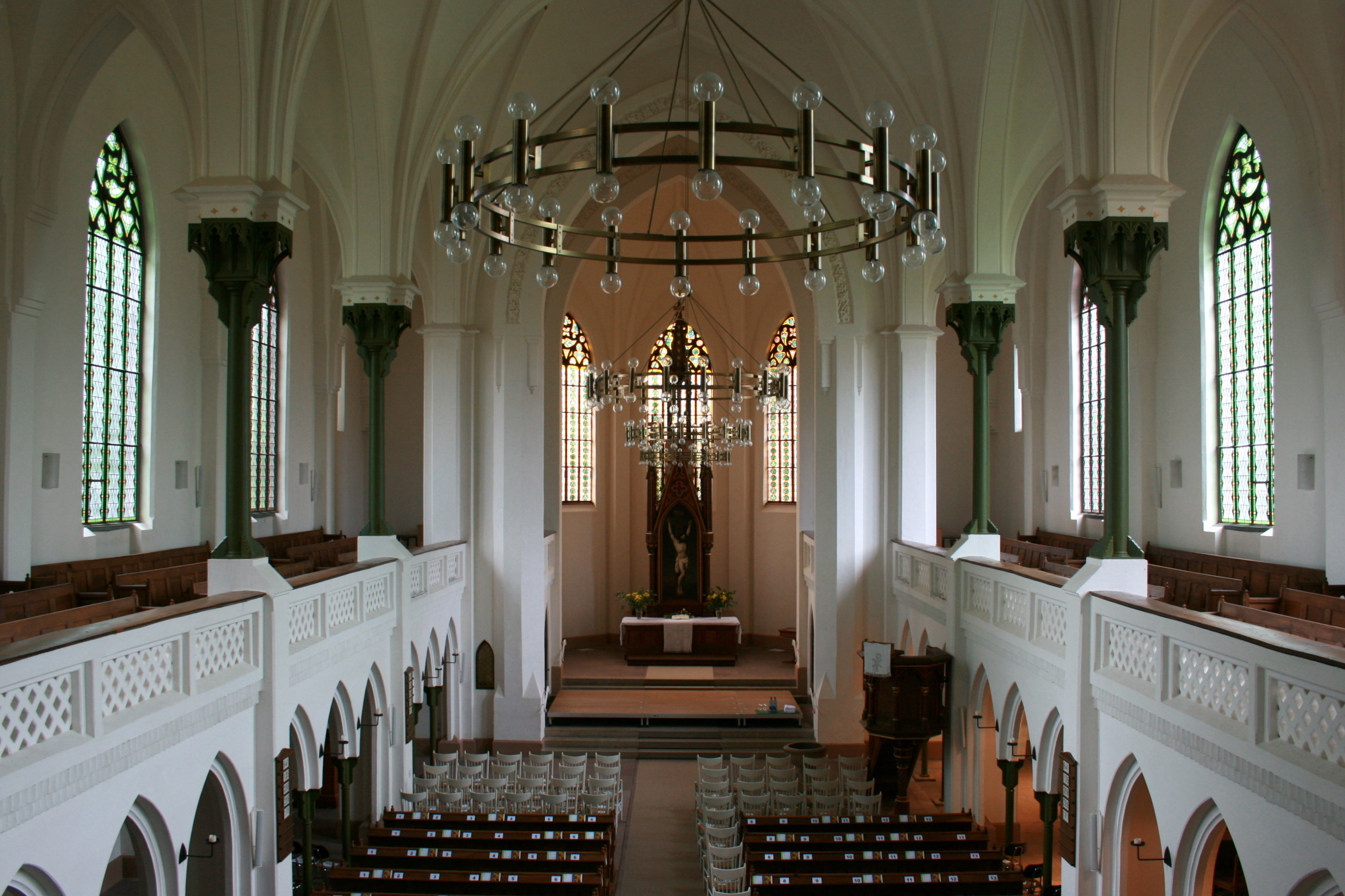 Evangelische Stadtkirche in Rotenburg (Wümme)